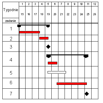 Gantt_przyklad_2